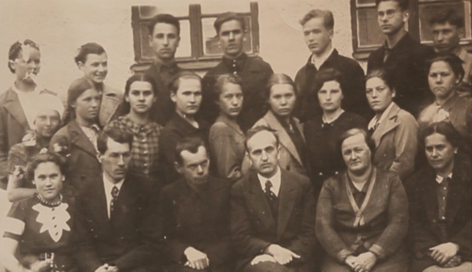 Воспитатели Нижнеисетского детского дома